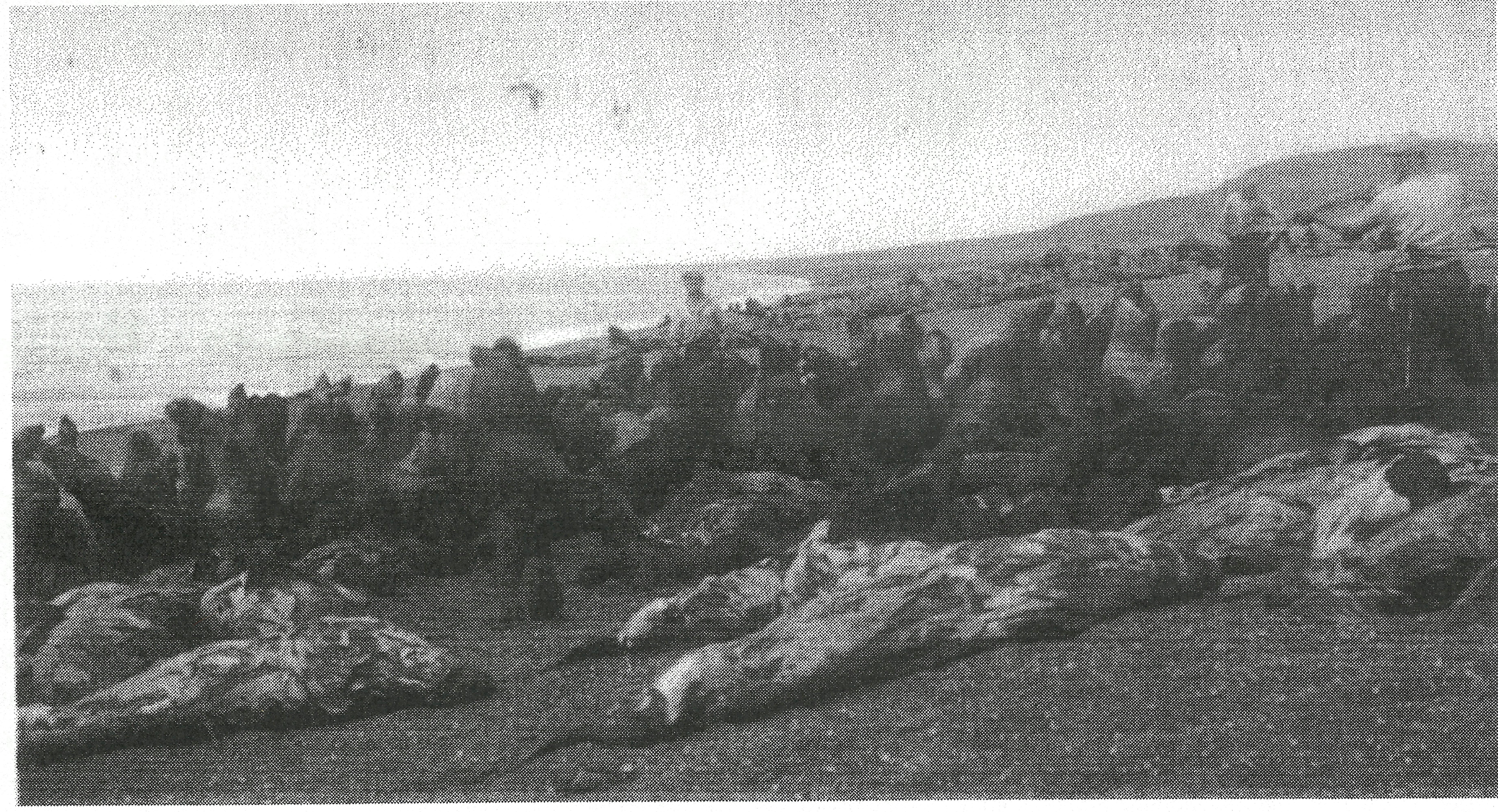 Matanza de lobos a manos del capataz con rifle. Atentos miran los peones para empezar a faenear. Los cuerpos sin grasa y sin piel se pudría en la playa hasta las marejadas los trasladaban.